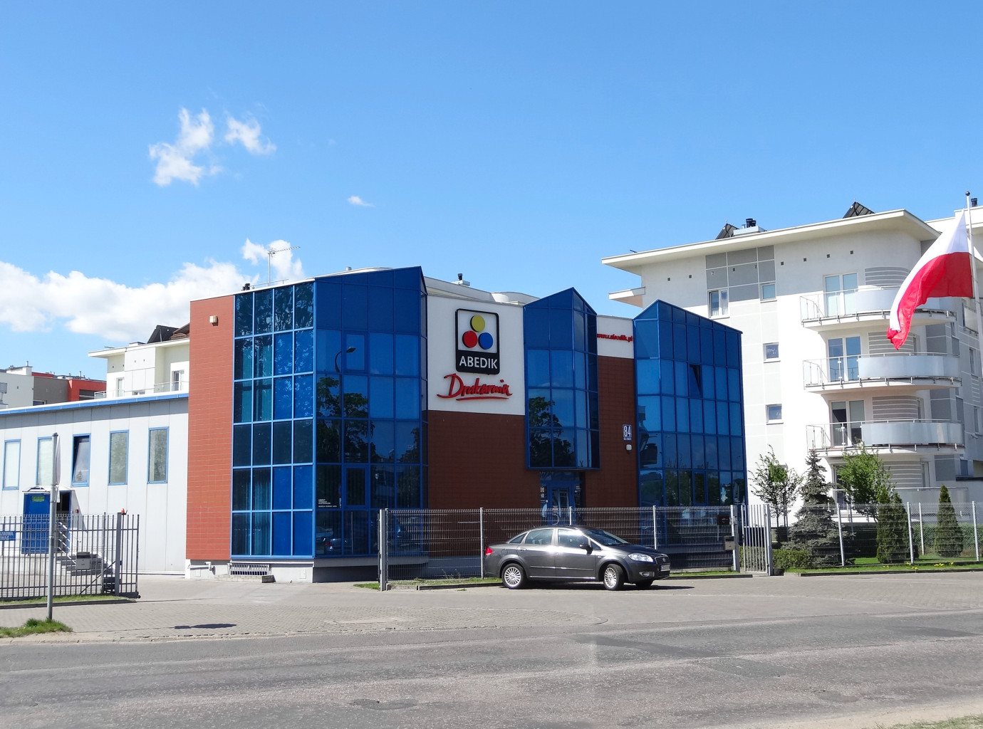 Drukarnia Abedik Sp. z o.o., ul. Glinki 84 w Bydgoszczy